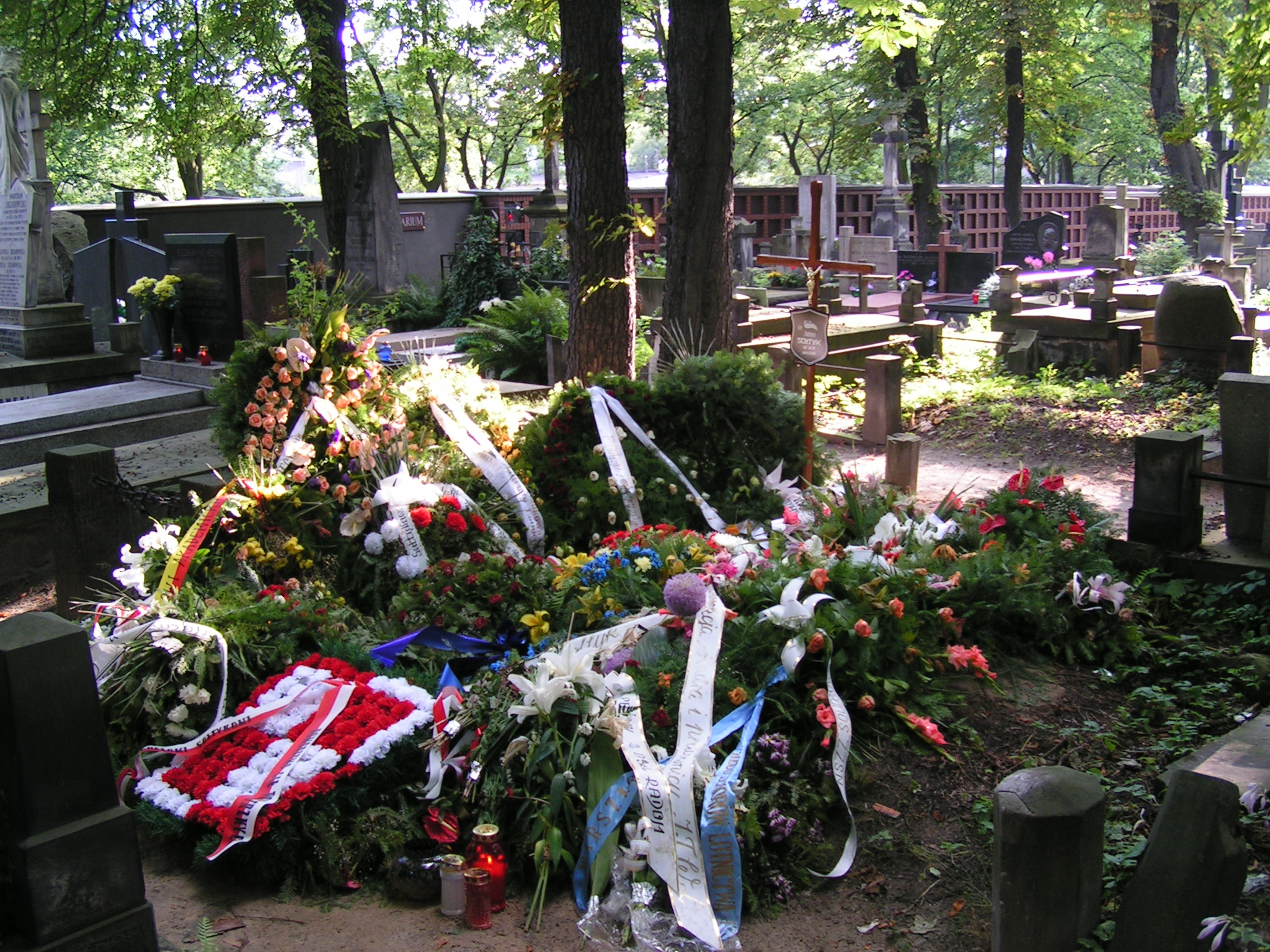 Mogiła prof. Tadeusza Sołtyka ma Starych Powązkach w Warszawie 25.07.2004 r. konstruktora samolotów: Szpak, Żak, Junak, Miś, Grot, Bies i Iskra.